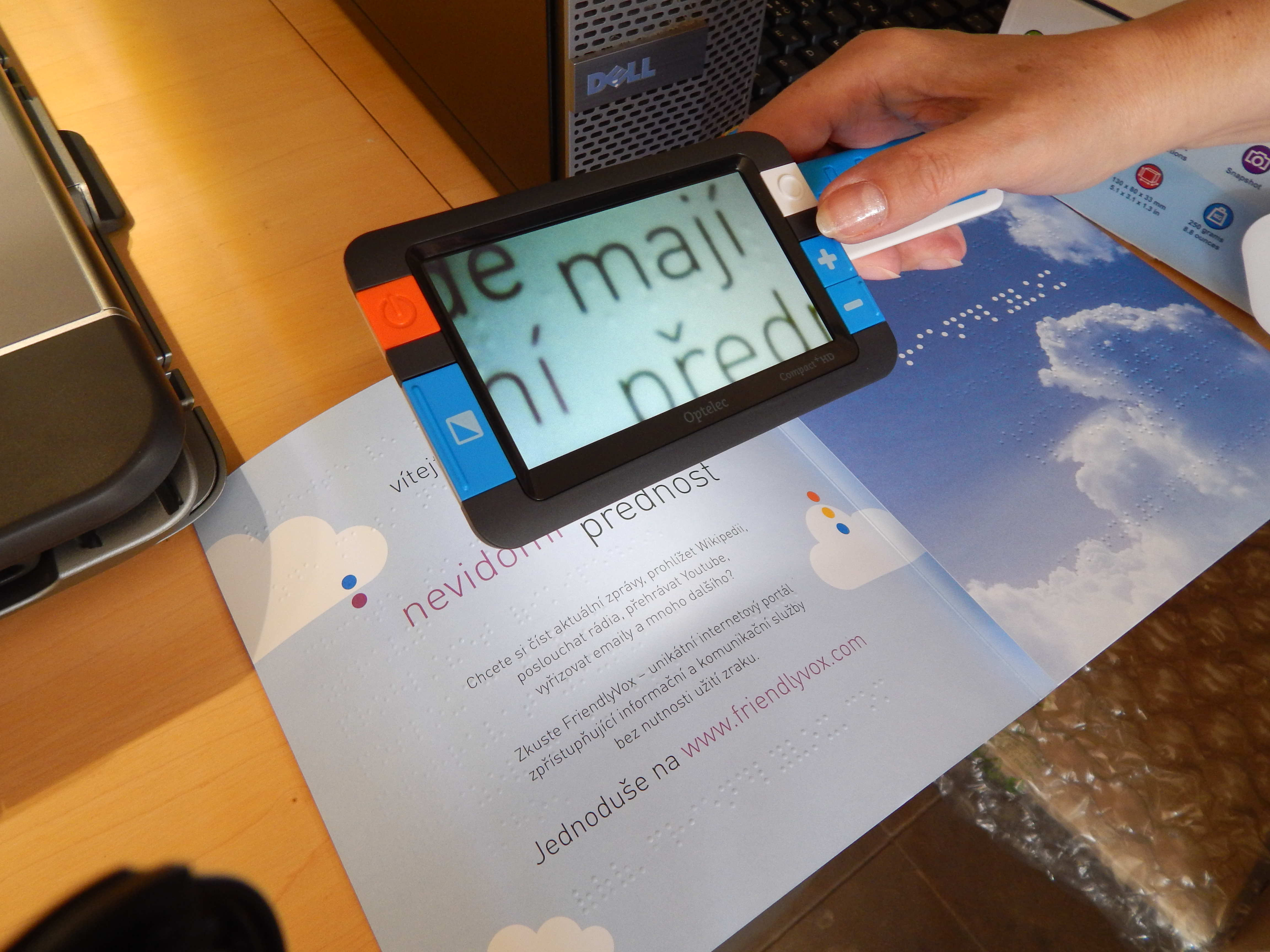 kamerová lupa, Krajská knihovna v Pardubicích